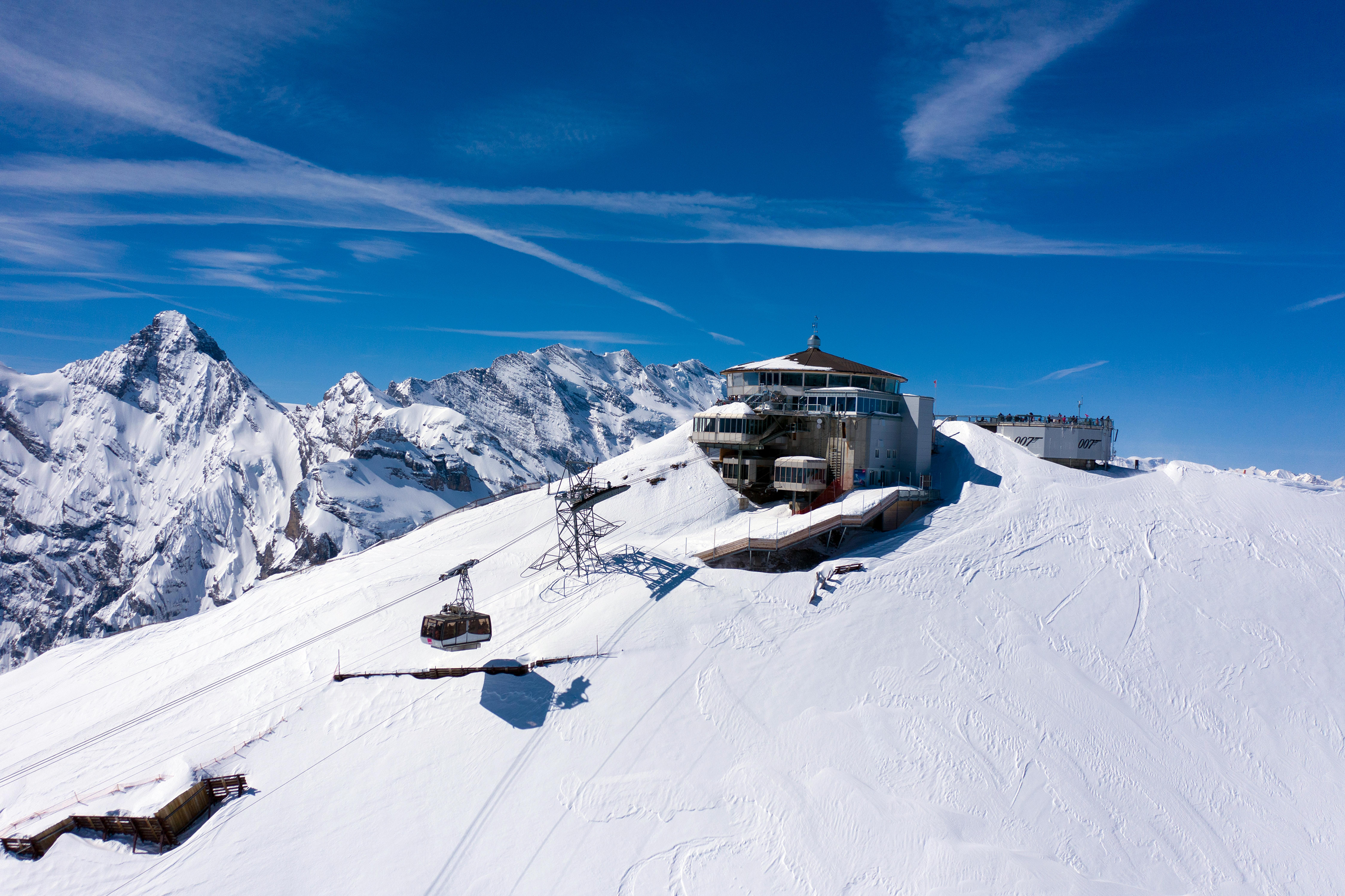 Gipfelgebäude Piz Gloria, Berge im Hintergrund: Blümlisalp, Wyssi Frou, Gspaltenhorn